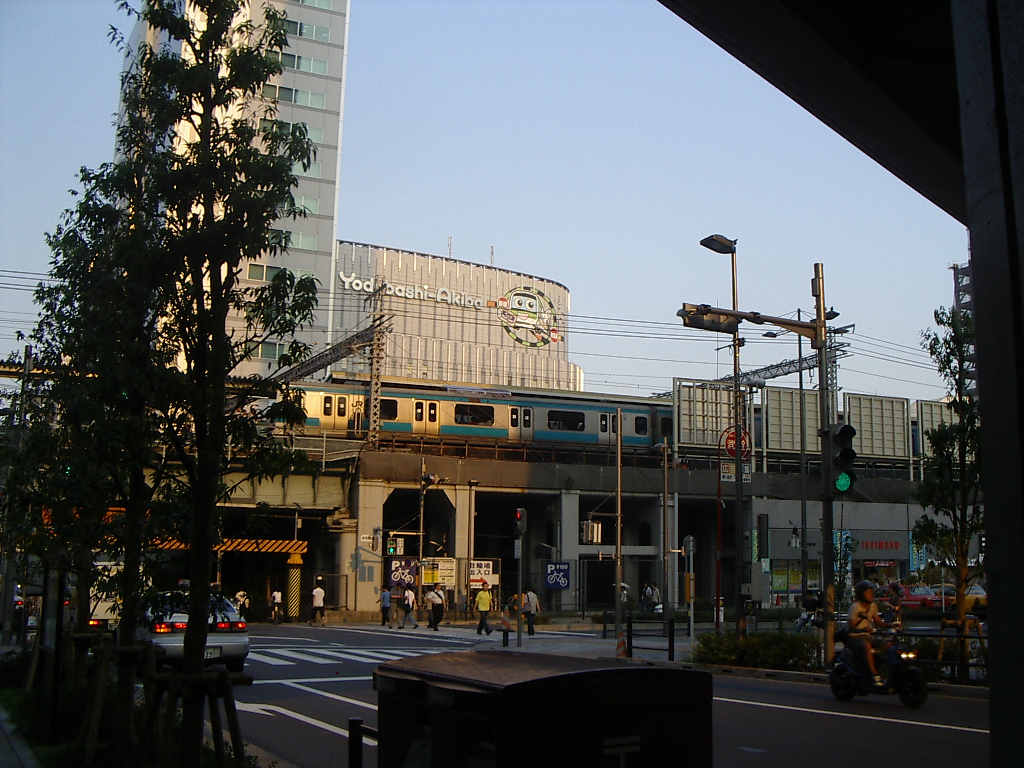 Yodobashi Camera in Akihabara taken from the Denkigai side